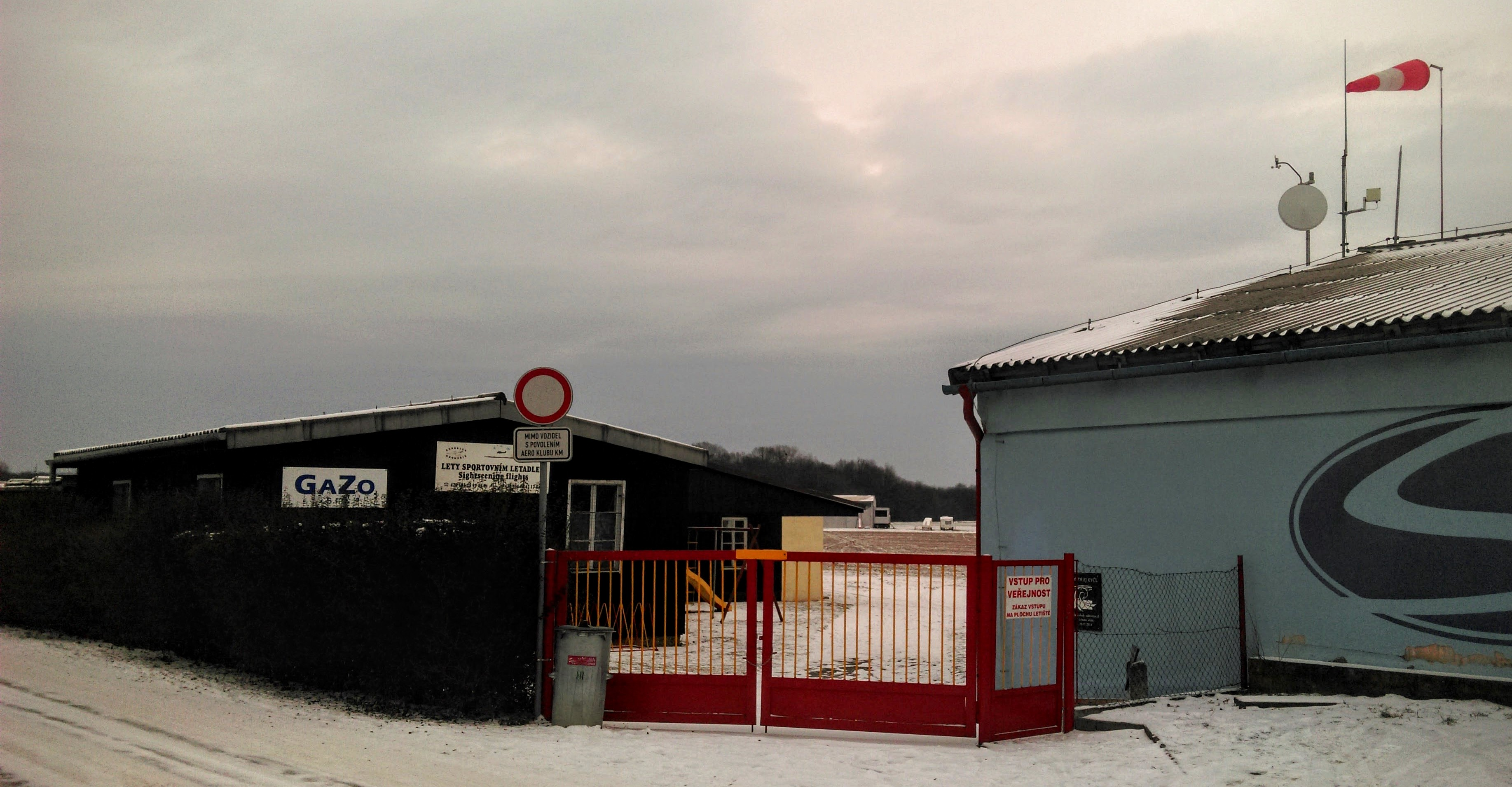 Letiště Kroměříž vstup